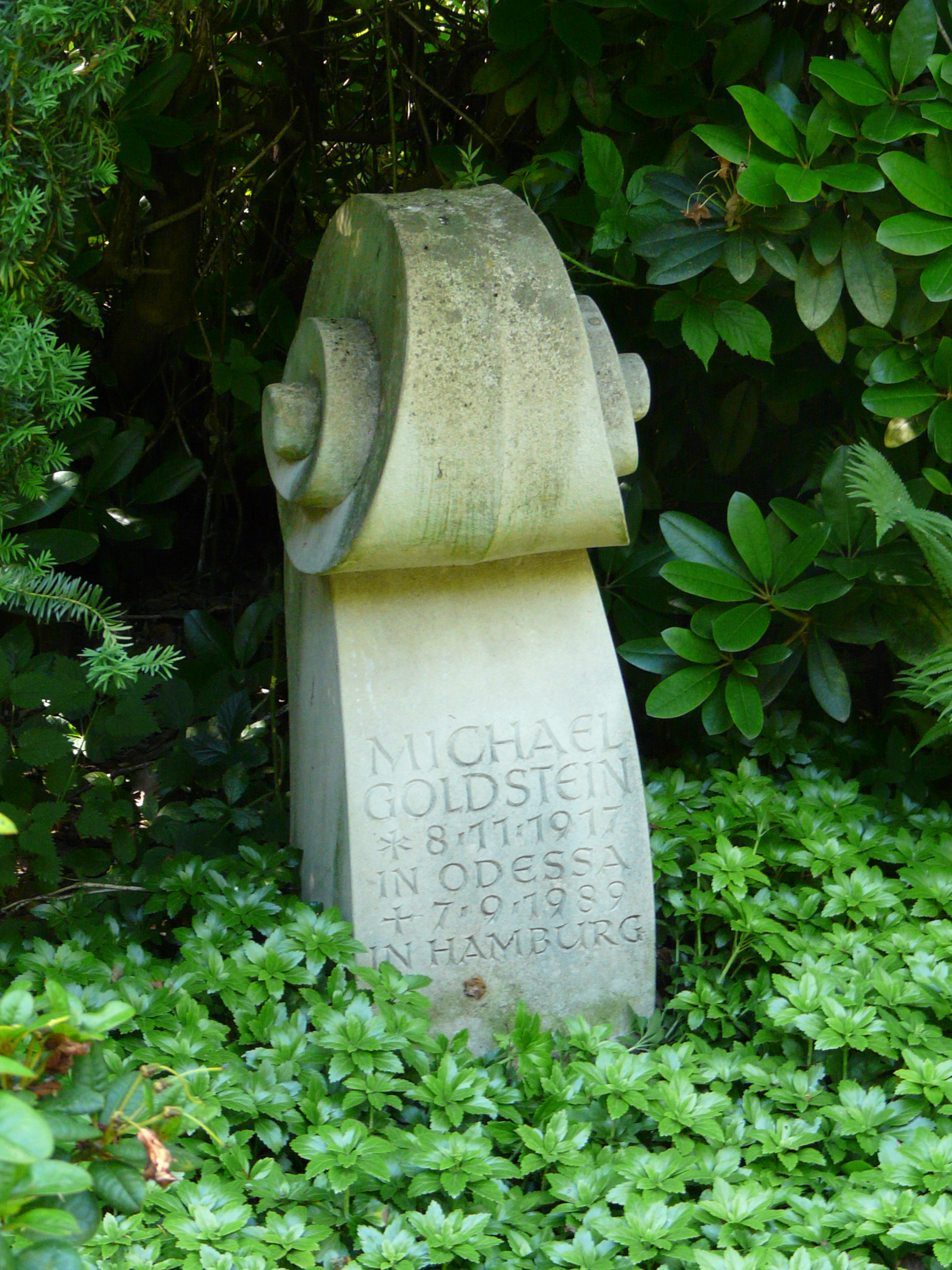 Grabmal Komponists Michael Goldstein in Hamburg-Ohlsdorf